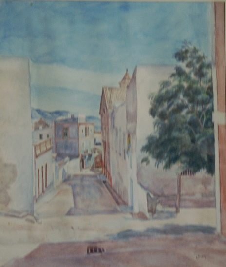 peinture